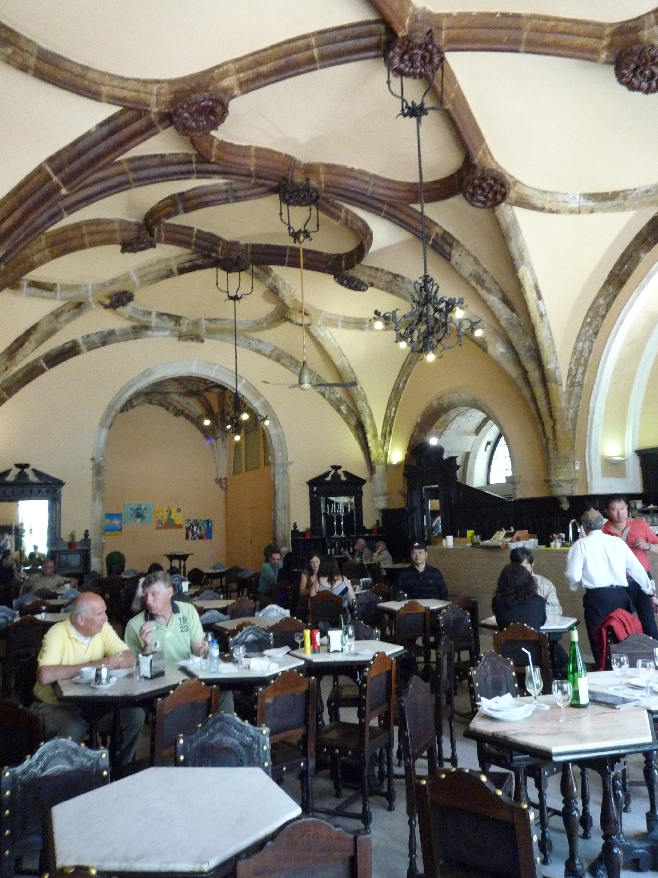 Interior of Santa Cruz Café, Coimbra